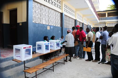 Votaciones en la primera vuelta de las Elecciones Presidenciales de Haití (28 de noviembre de 2010).